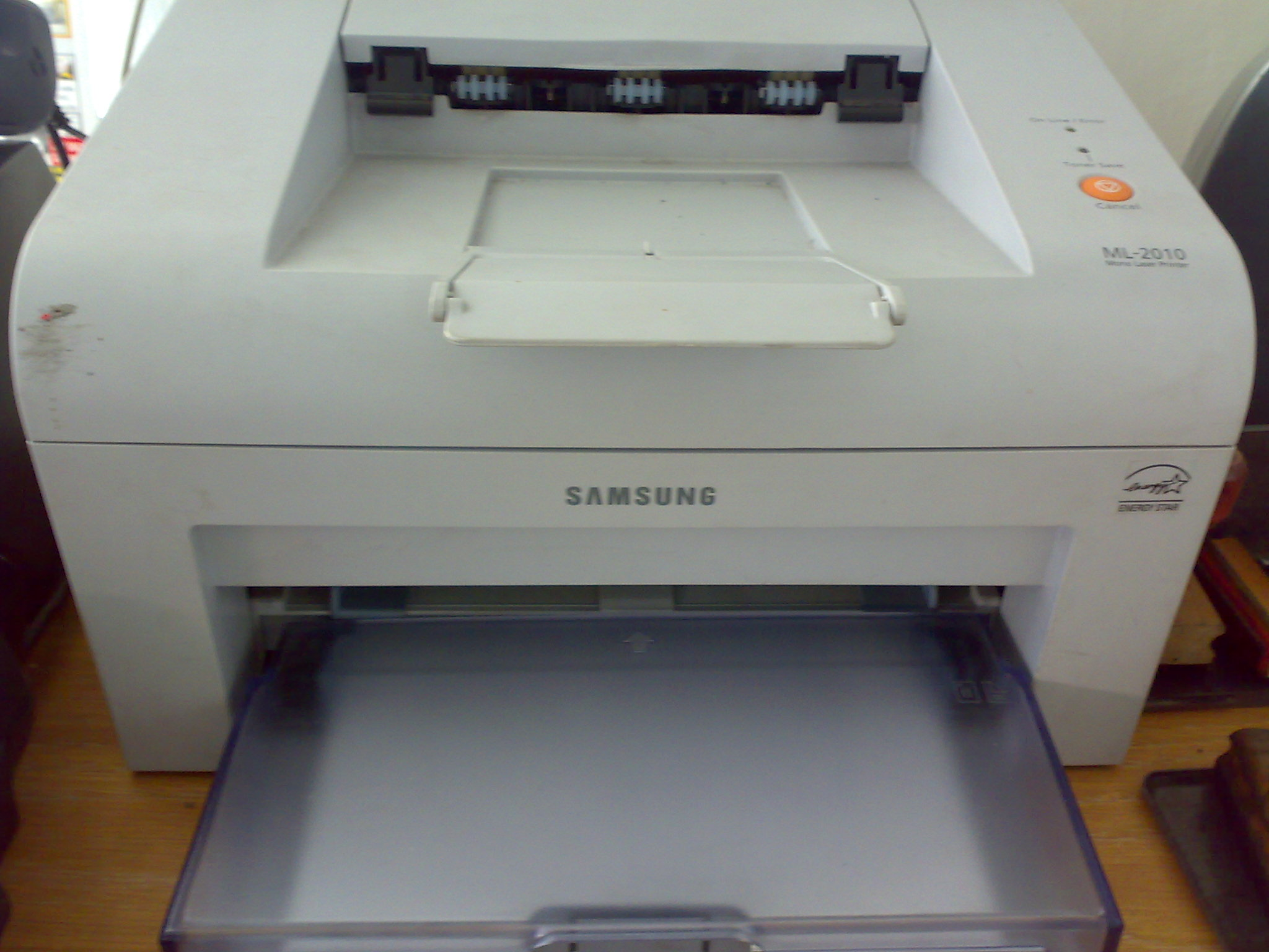 impresora laser